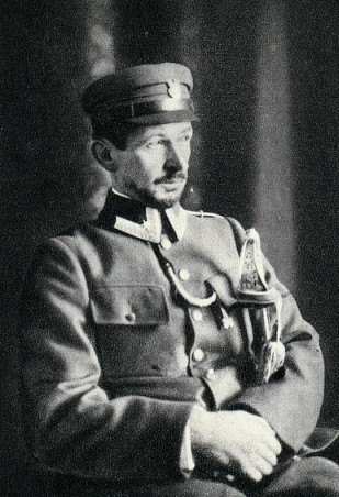 Chor. Władysław Orkan podczas służby w Legionach Polskich.